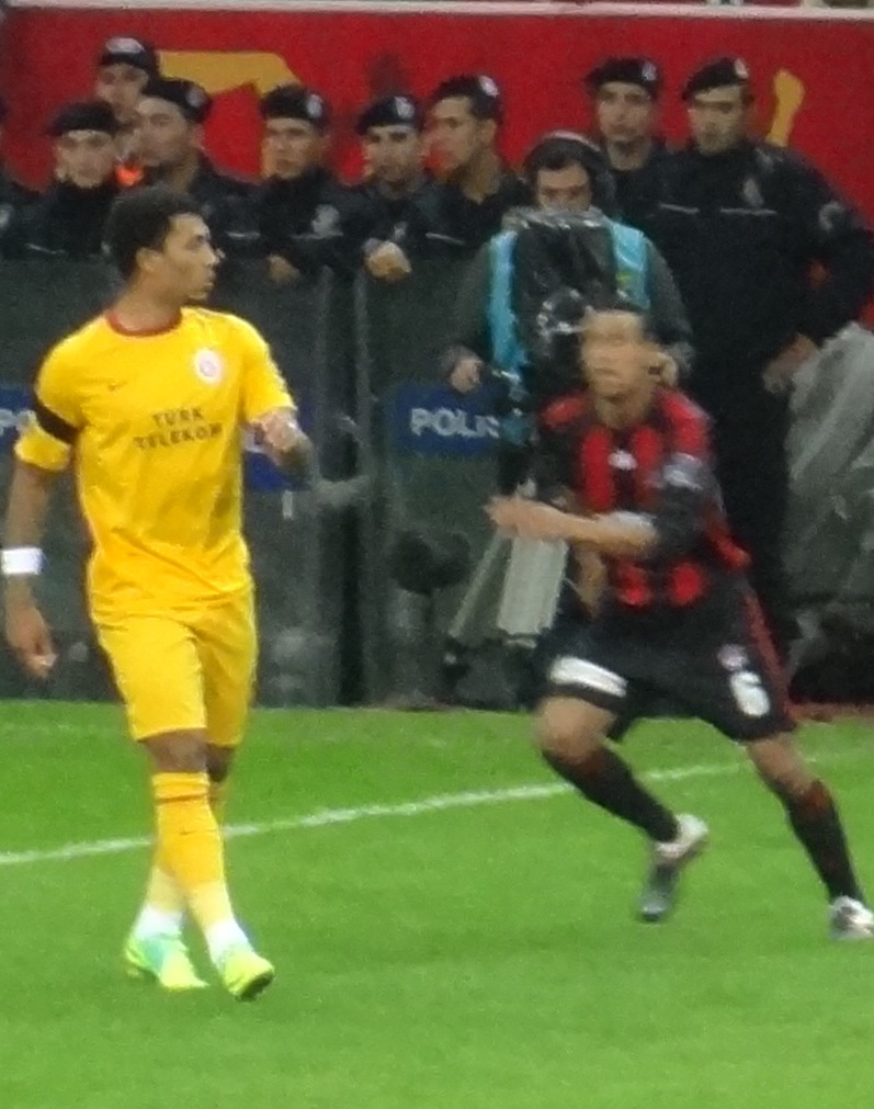 İvan de Souza Antepspor